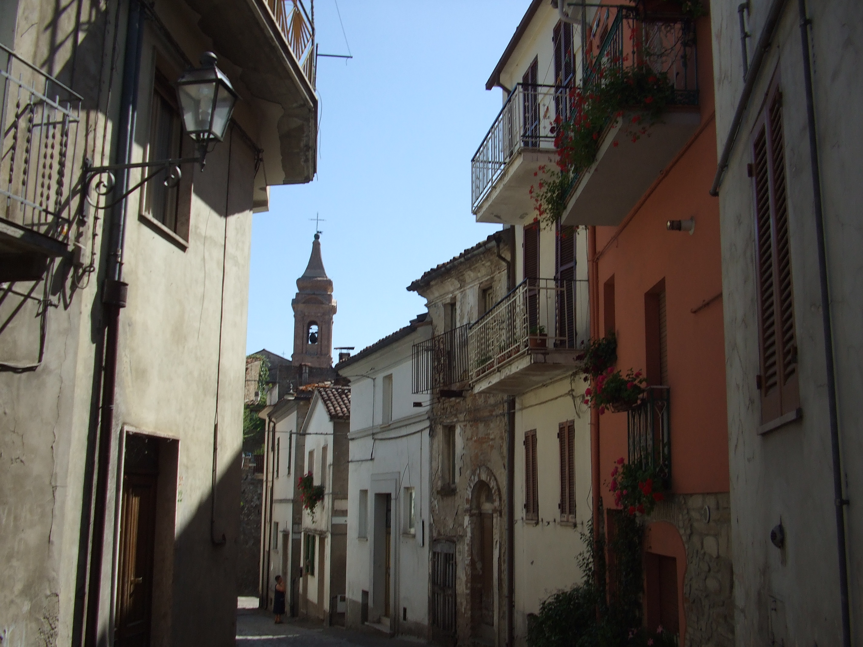 Immagine di via Rampigno con sullo sfondo il campanile di Bisenti mentre le campane suonano a festa per la solennità della Madonna degli Angeli (2 agosto 2008)